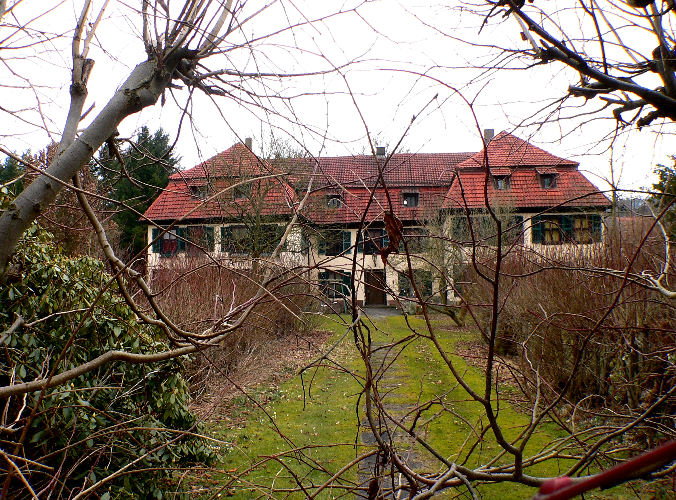 Gelbes Schloss Wehrda in Haunetal-Wehrda, Hessen, Regierungsbezirk Kassel, Landkreis Hersfeld-Rotenburg